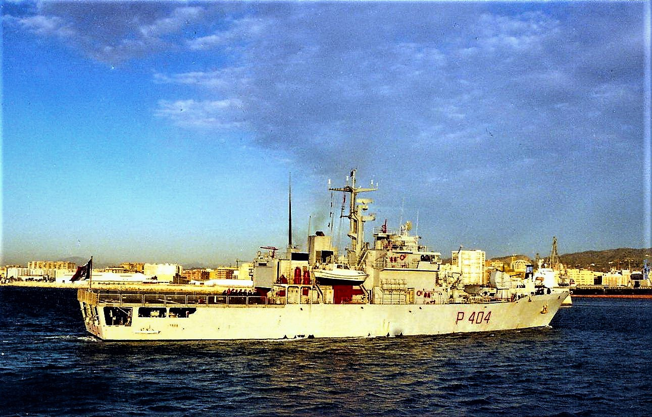 Il pattugliatore Vega lascia Malaga